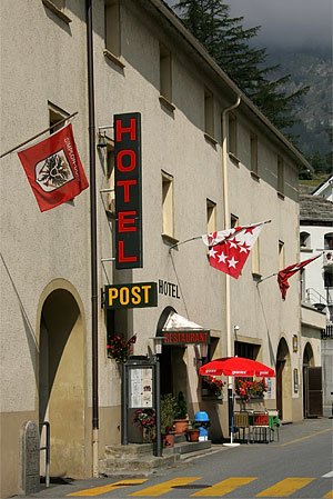 Hotel Post in Simplon-Dorf